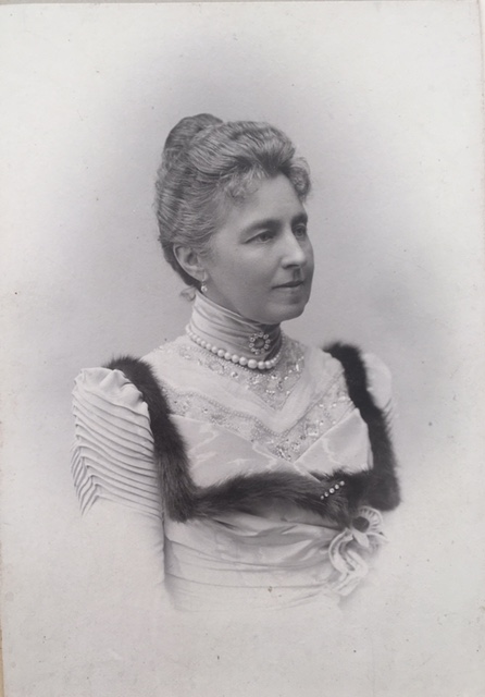 Caroline Wijk, född Dickson, (1846-1918). Gift 1870 med Olof Wijk d.y. (1833-1901).